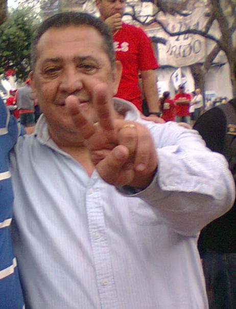 Luis D’Elía. Foto sacada el 17 de octubre de 2013